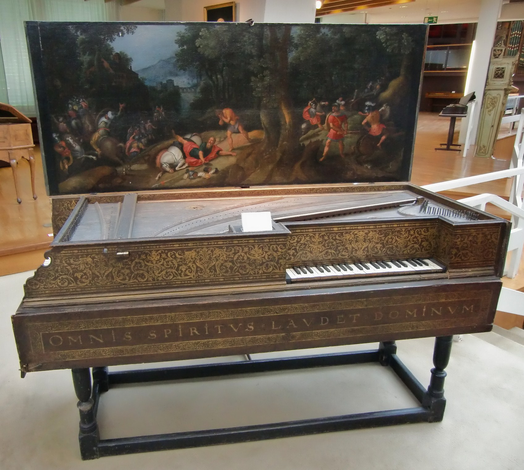 Combiné clavecin-virginal de Ioannes Ruckers, Anvers vers 1628 - Berlin, Musikinstrumentenmuseum